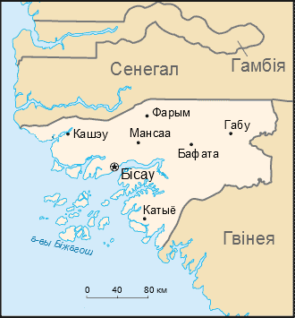 карта Гвінеі-Бісау